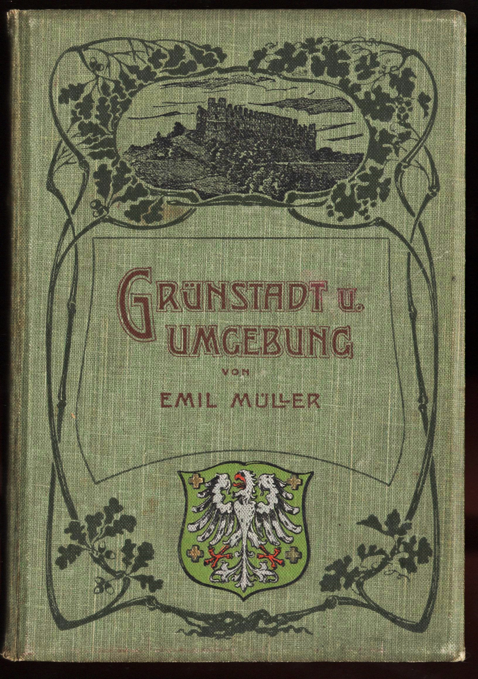 Grünstadter Buch, 1904, eigener Scan vom eigenen alten Buch